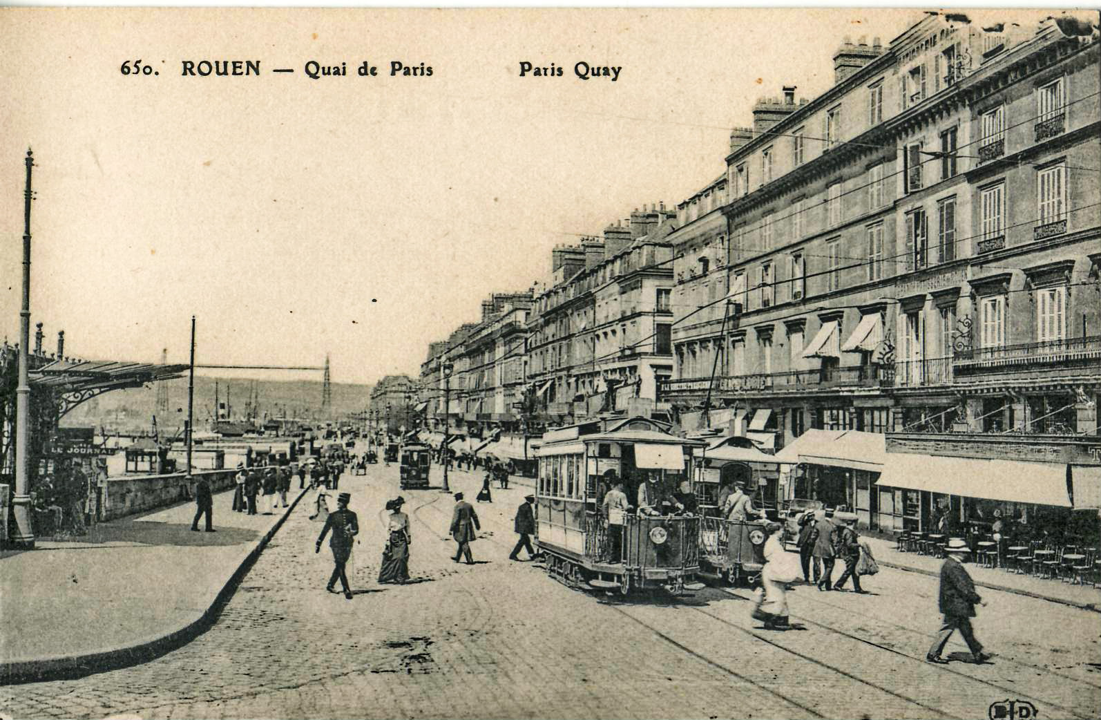 Carte postale ancienne éditée par ELD pour Marcel Raitre à Rouen, n°650 : ROUEN - Quai de Paris